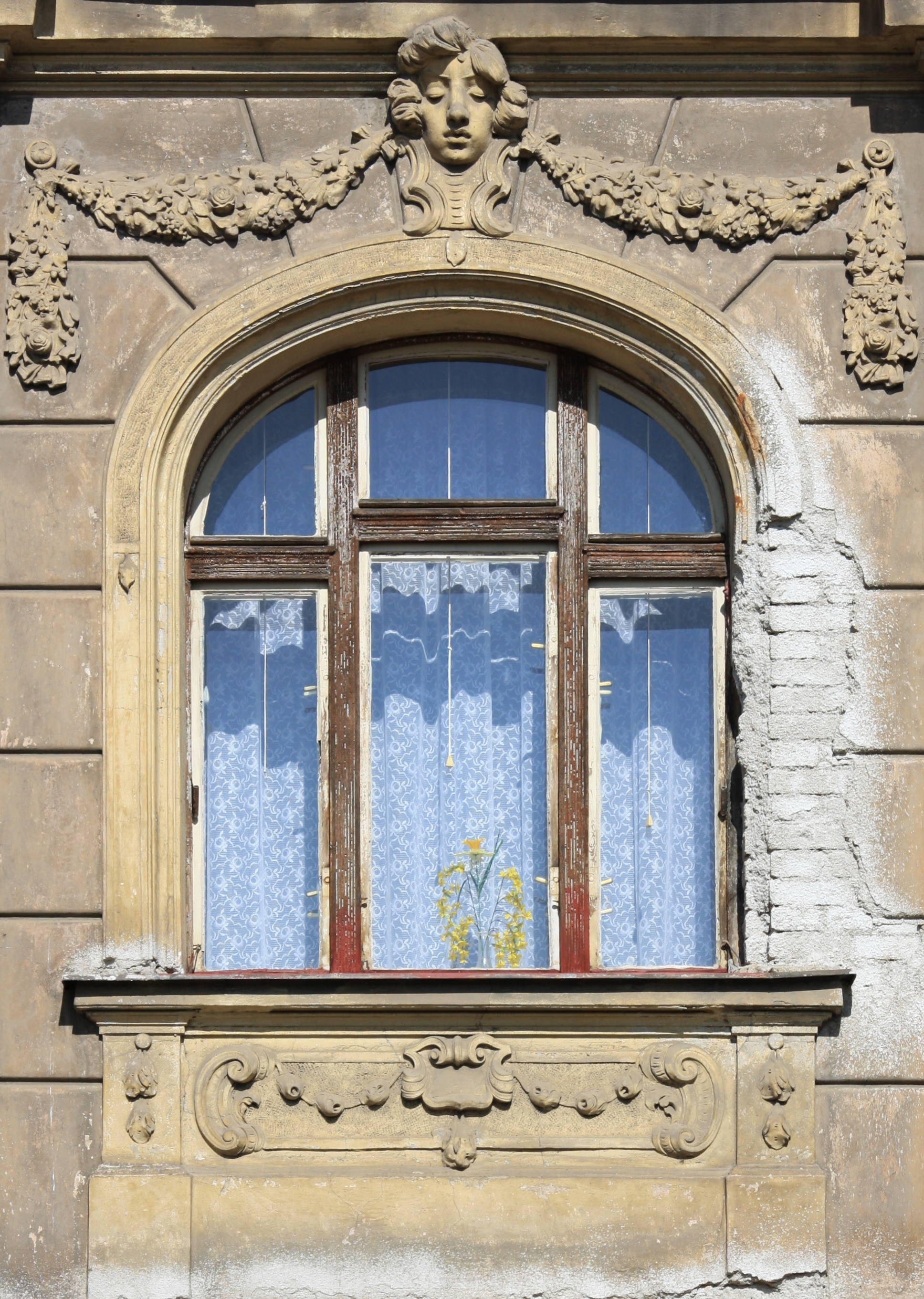 Praha, Vršovice - Kodaňská č. p. 552